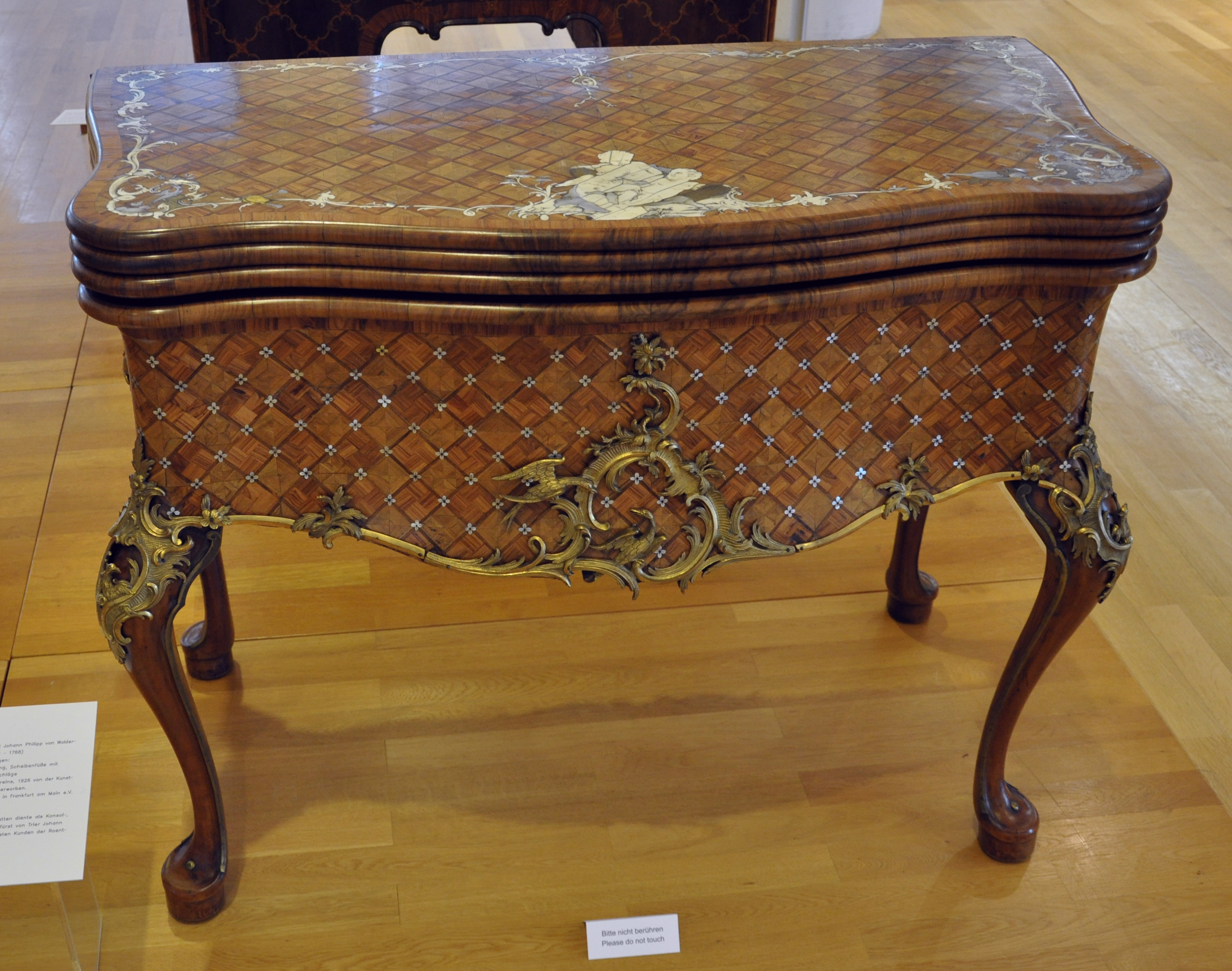 Verwandlungstisch (Konsol-, Spiel-, Musik- und Schreibtisch), von Abraham Roentgen, Neuwied um 1760; gefertigt für den Erzbischof und Kurfürsten Johann Philipp von Walderdorff; Nussbaum, Mahagoni, Apfelholz, Einlagen: Königsholz, Elfenbein, Perlmutt, Messing, Scheibenfüße mit Gleitrollen, feuervergoldete Bronzebeschläge; Museum für Angewandte Kunst Frankfurt am Main, Inv. Nr. V. 70 (Dauerleihgabe Kunstgewerbeverein Frankfurt)